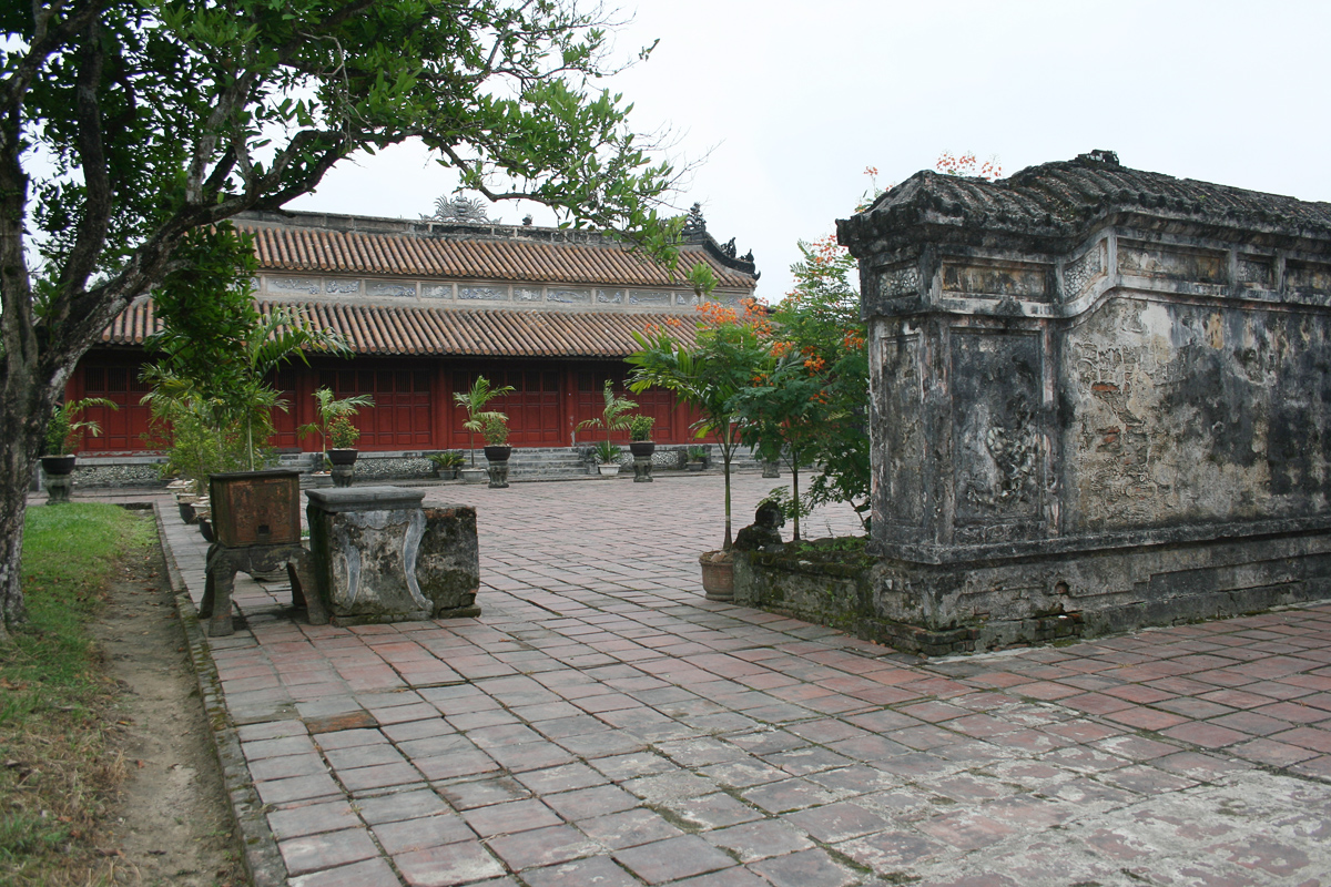 Điện Long Ân, An Lăng, nơi thờ cúng vua Dục Đức, Thành Thái và Duy Tân